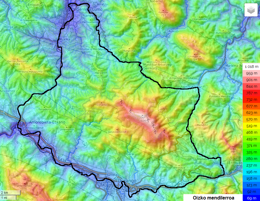 Oizko mendilerroaren mapa topografikoa.